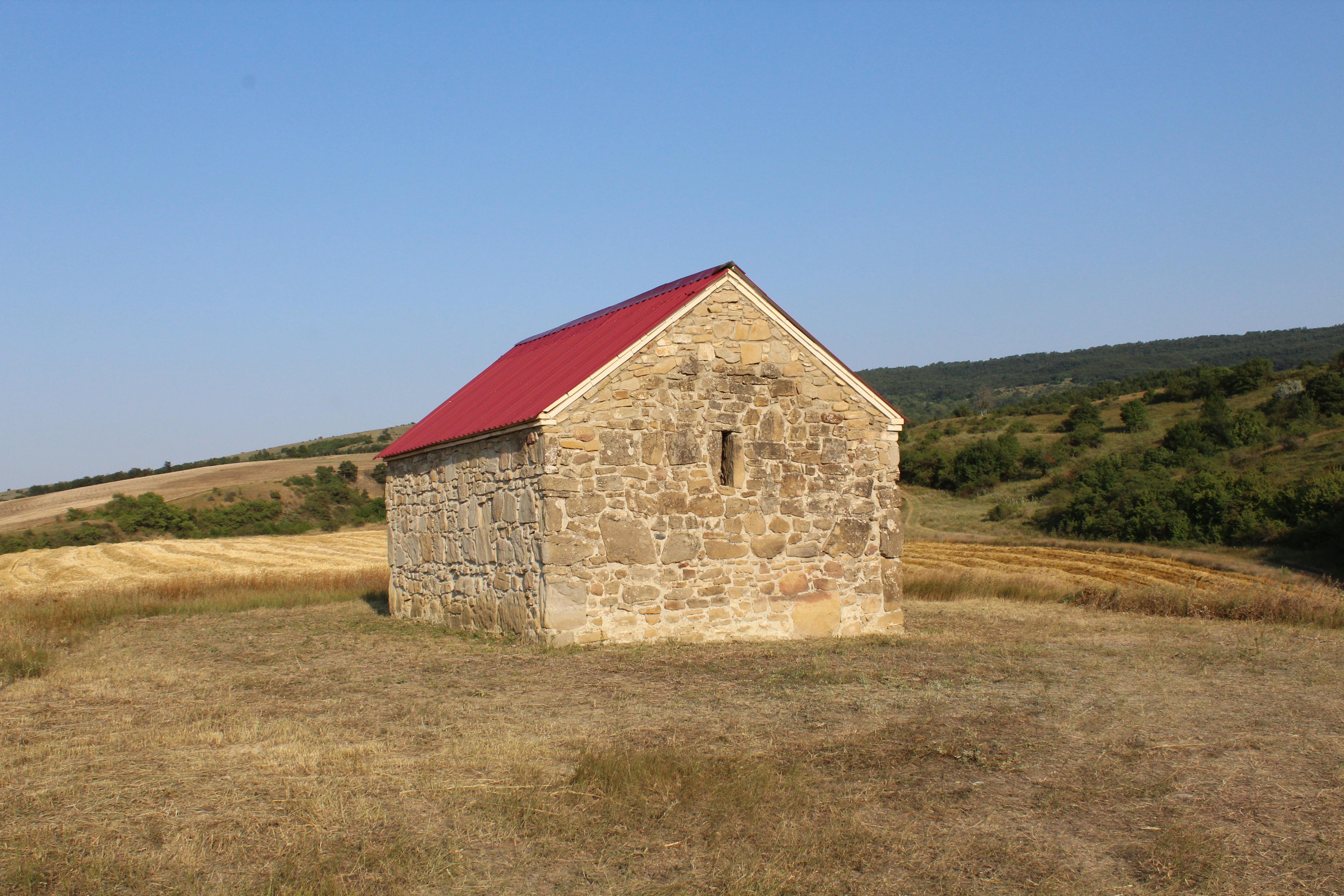 წრომის წმინდა მარინეს ეკლესია